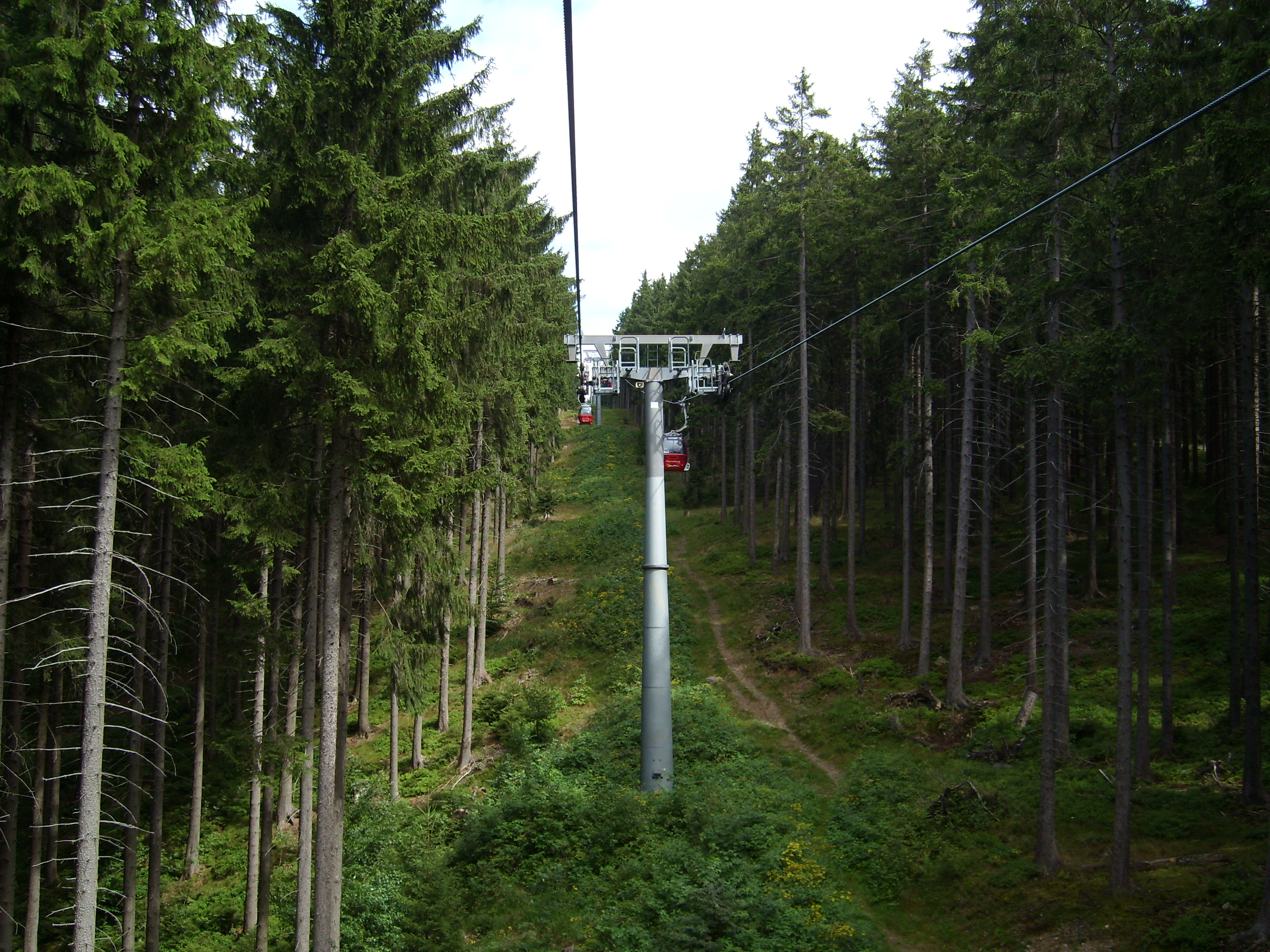 Wurmbergseilbahn in Braunlage im Harz, kurz nach der Abfahrt von der Talstation